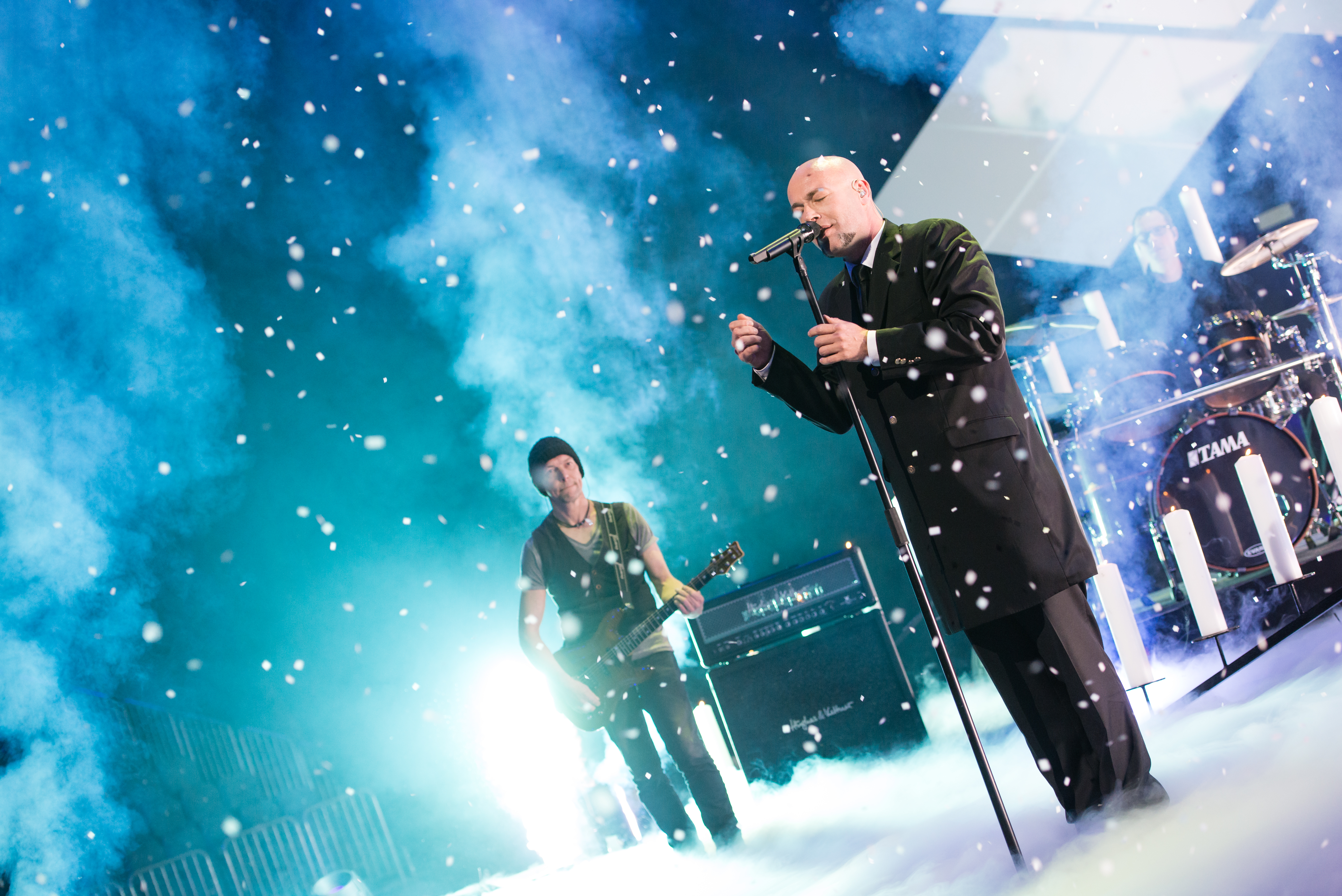 'Eurovision Song Contest 2014 - Unser Song für Dänemark': 'Unheilig'